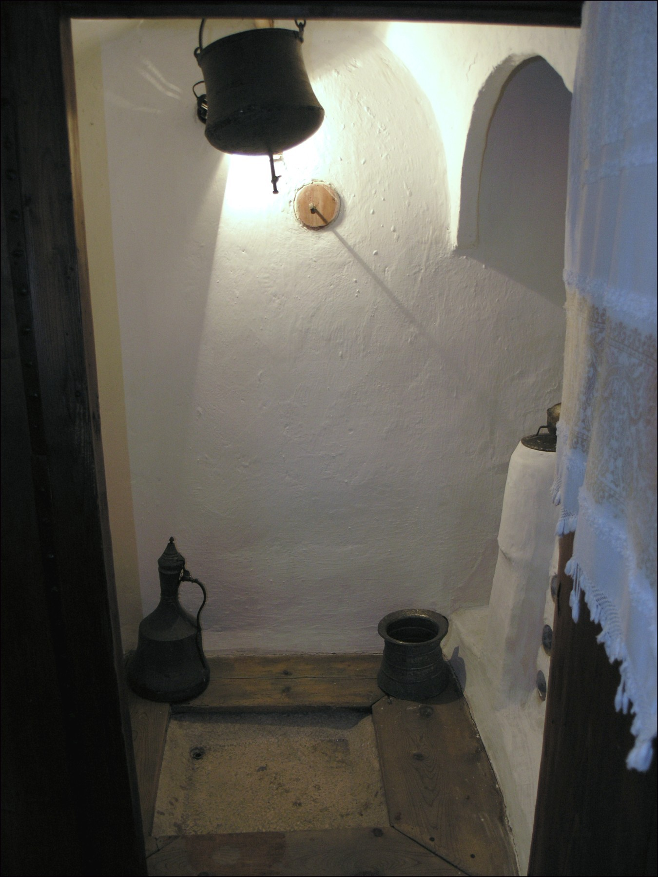 BiH, Sarajevo - Svrzina kuća